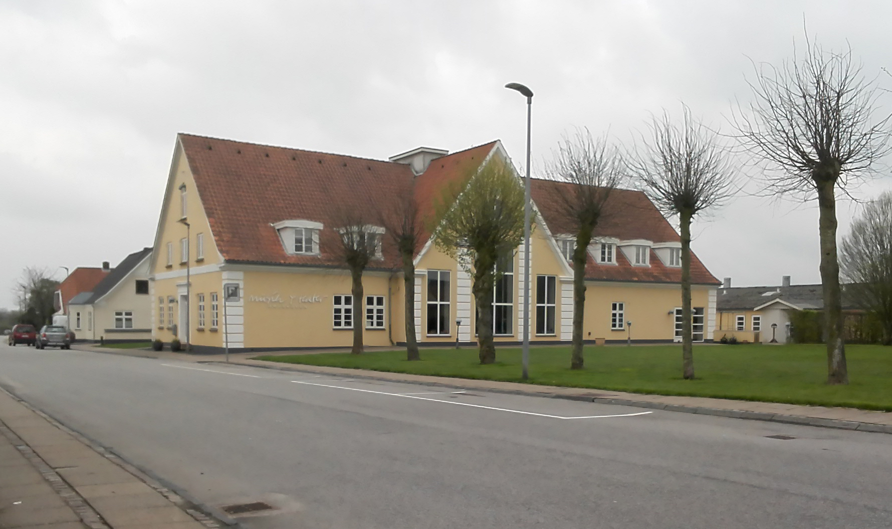 Musik og Teaterhøjskolen i Toftlund